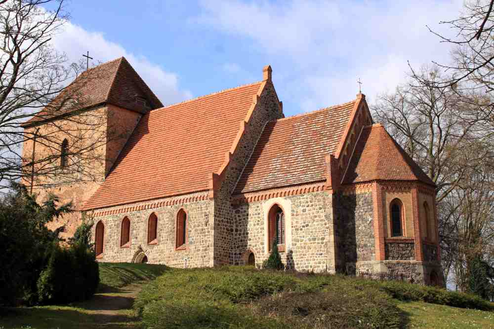 Wehrkirche zu Kirch-Grubenhagen